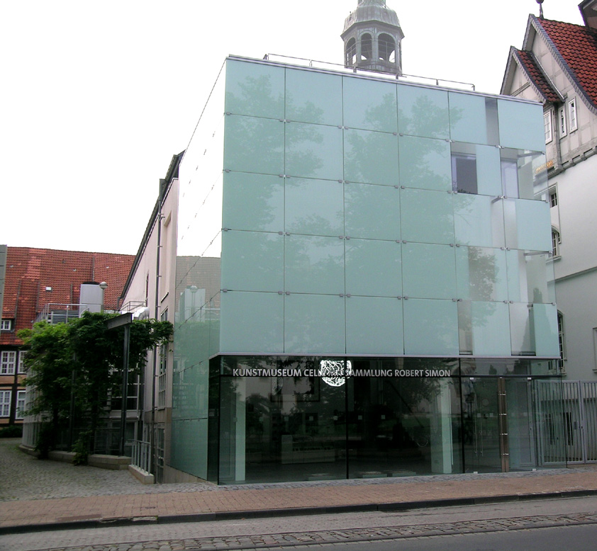 Kunstmuseum Celle, Celle, Germany.